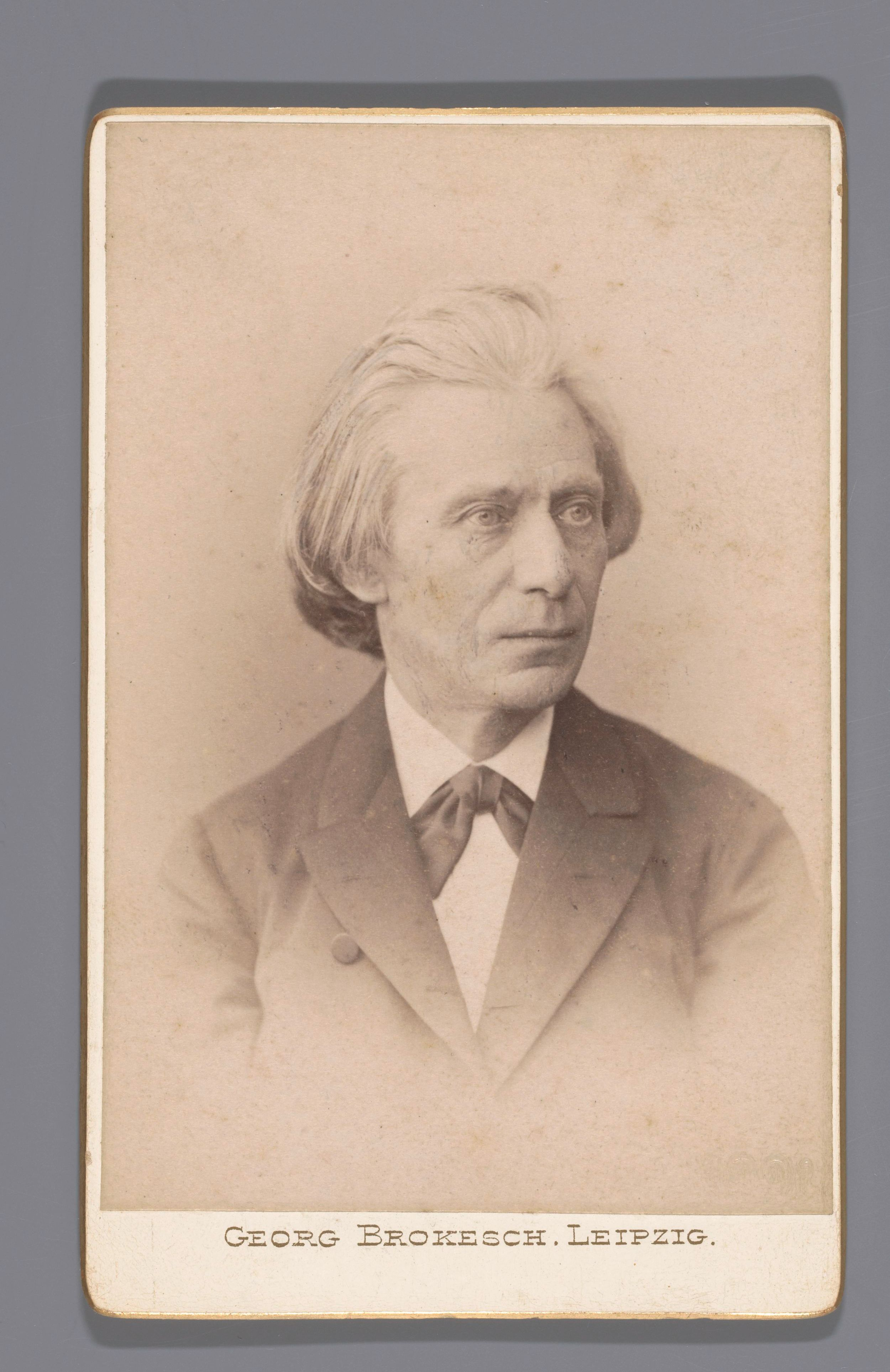 IdentificatieTitel(s): Portret manObjecttype: foto carte-de-visite Objectnummer: RP-F-F02854Opschriften / Merken: signatuur, verso, gedrukt: ‘Pramiiri mit ersten Preisen: Leipzig 1879 Dresden 1879 ... Georg Brokesch Leipzig...’opschrift, verso, geschreven: ‘Oom Engelbert Rontgen’VervaardigingVervaardiger: fotograaf: Georg Brokesch (vermeld op object)Plaats vervaardiging: LeipzigDatering: 1891Fysieke kenmerken: albuminedrukMateriaal: papier karton Techniek: albuminedrukAfmetingen: foto: h 94 mm × b 63 mmblad: h 105 mm × b 66 mmVerwerving en rechtenVerwerving: overdracht van beheer 1994Copyright: Publiek domein